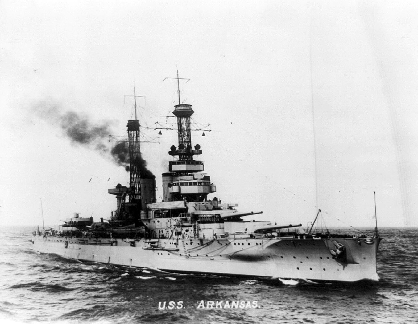 USS Arkansas (BB-33) c. 1920